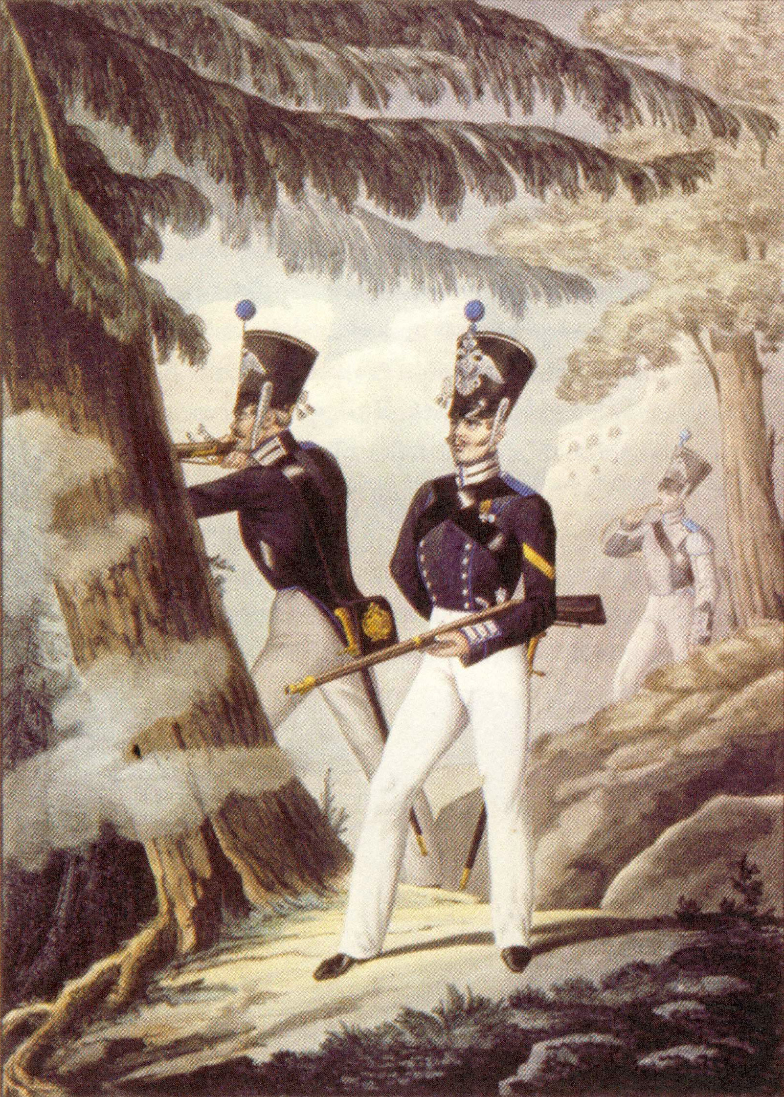 Suomen kaartin tarkk'ampujia vuoden 1830 univormuissa. Etualalla aliupseeri, taustalla torvensoittaja. Pierre Vernet'n litografia.